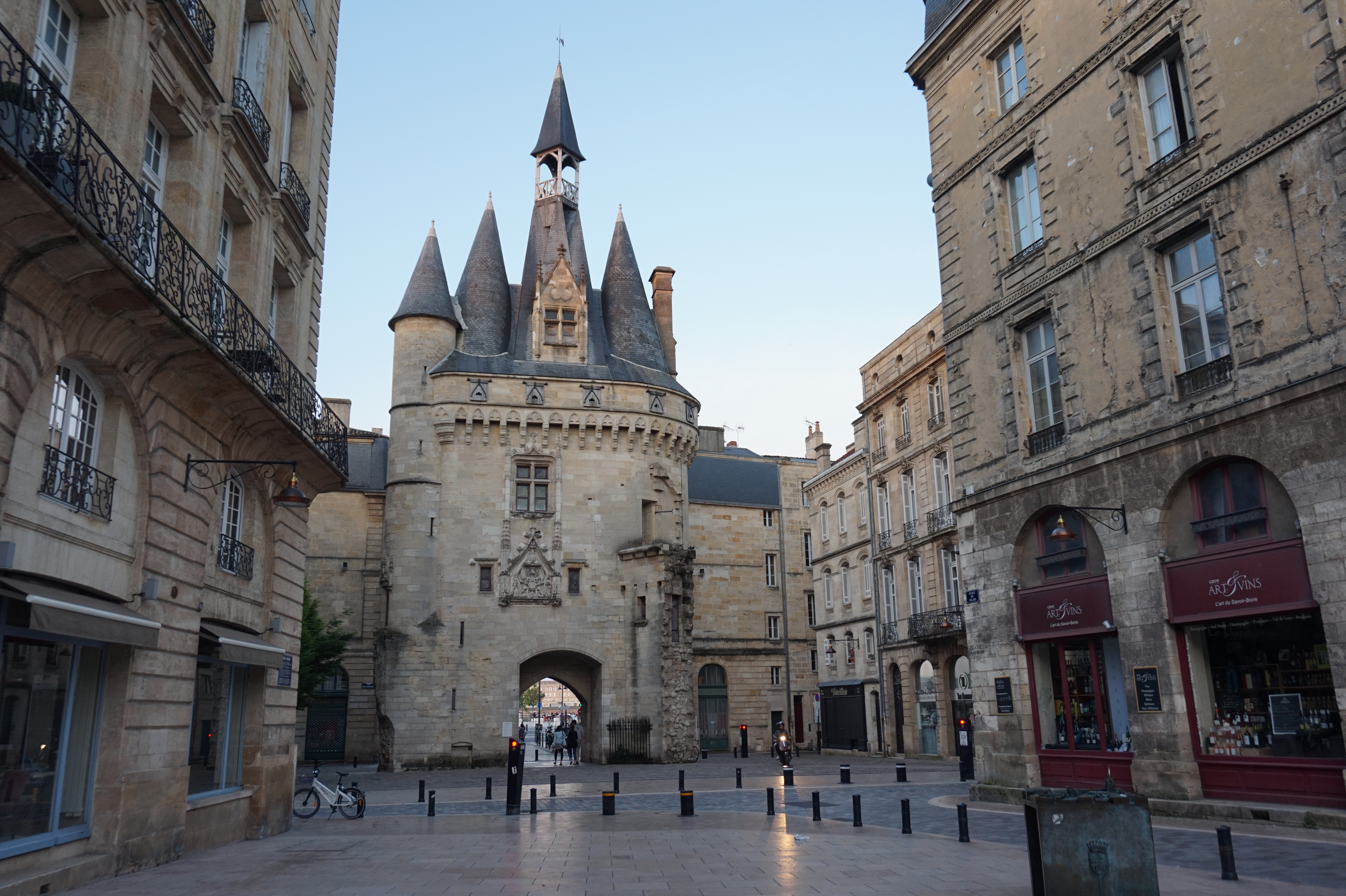 Porte Cailhau, Bordeaux, France